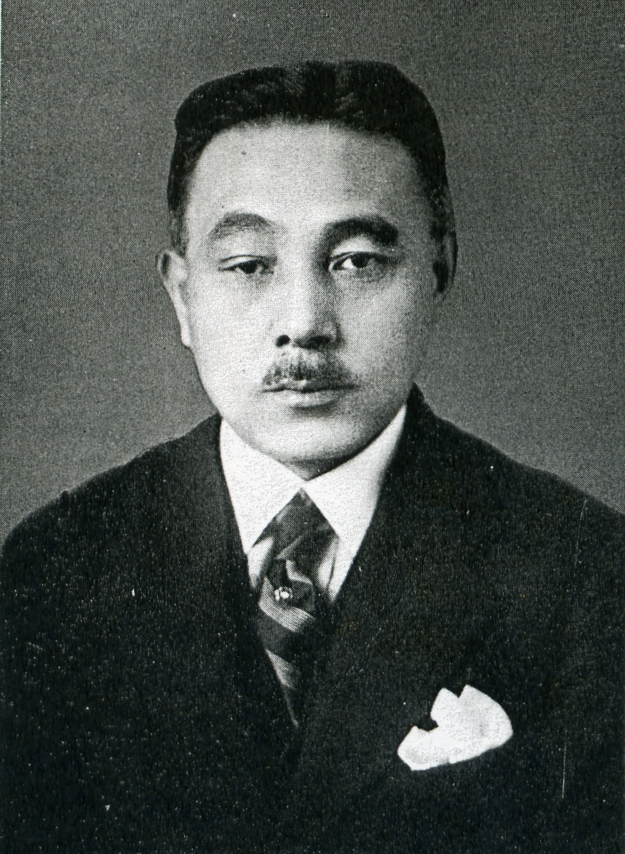 この写真は、兼田秀雄（1880-1937）の写真です。